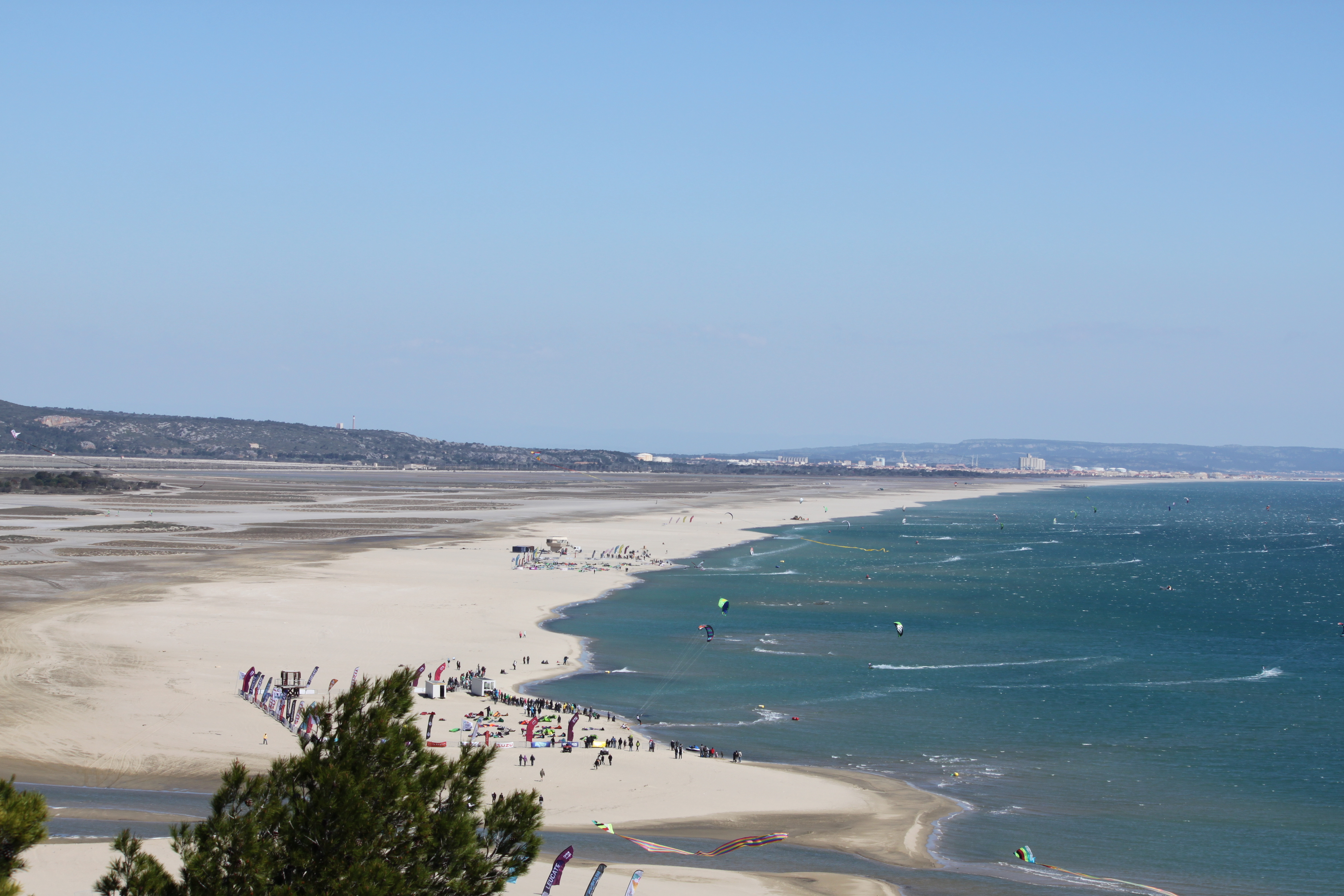 Leucate - La Franqui - Aude France